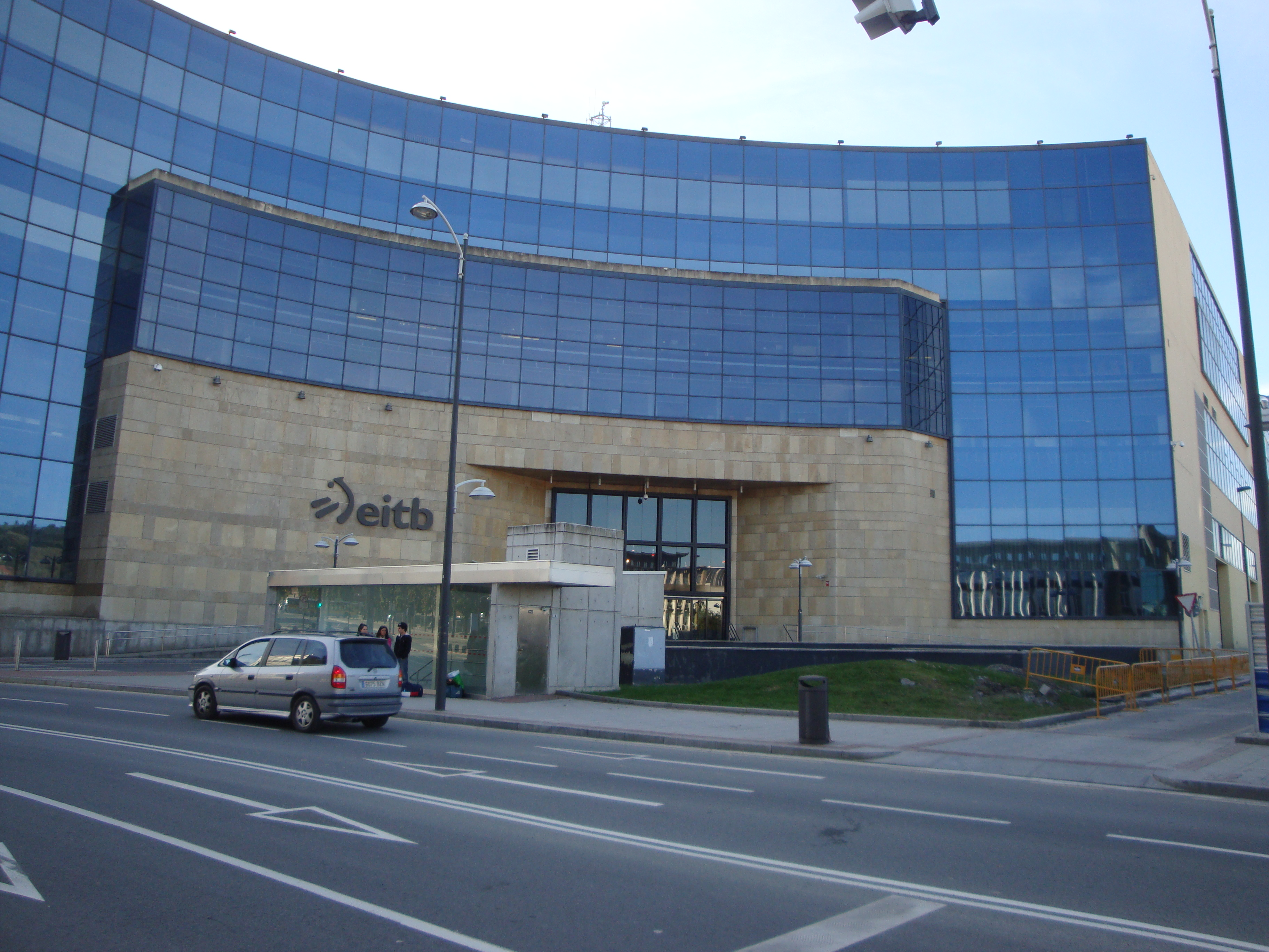 EITB-ren Bilboko egoitza